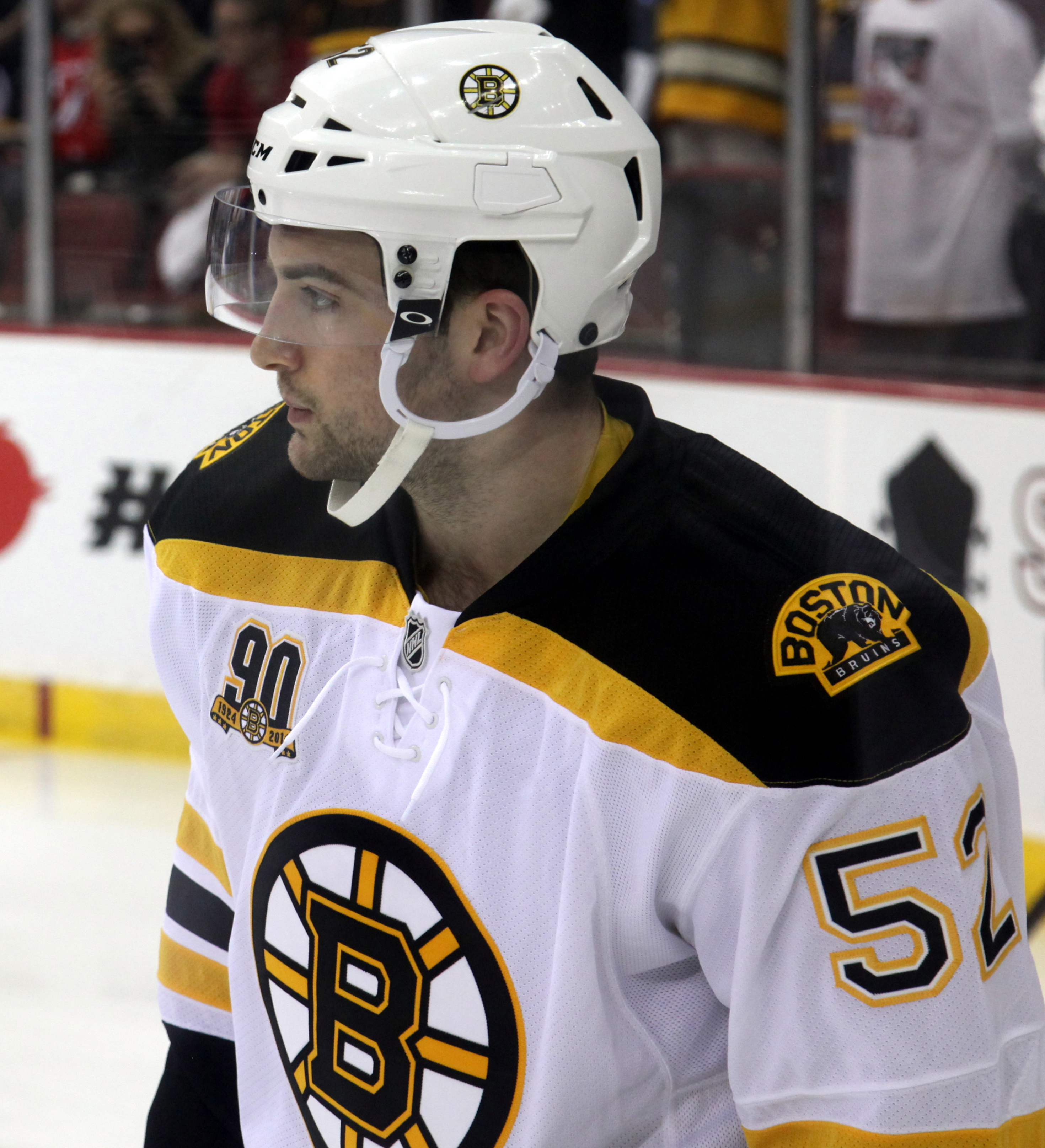 Matt Lindblad in 2014.